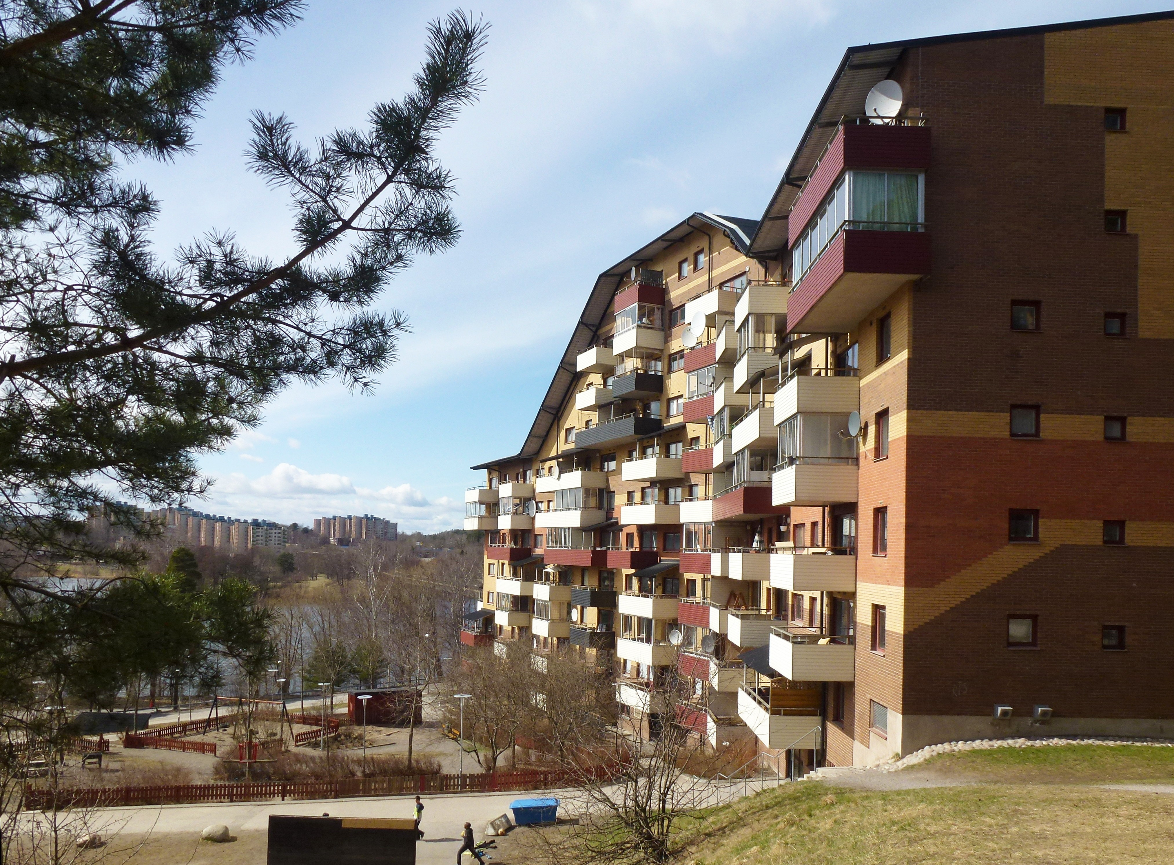 Bebyggelsen Myrstuberget